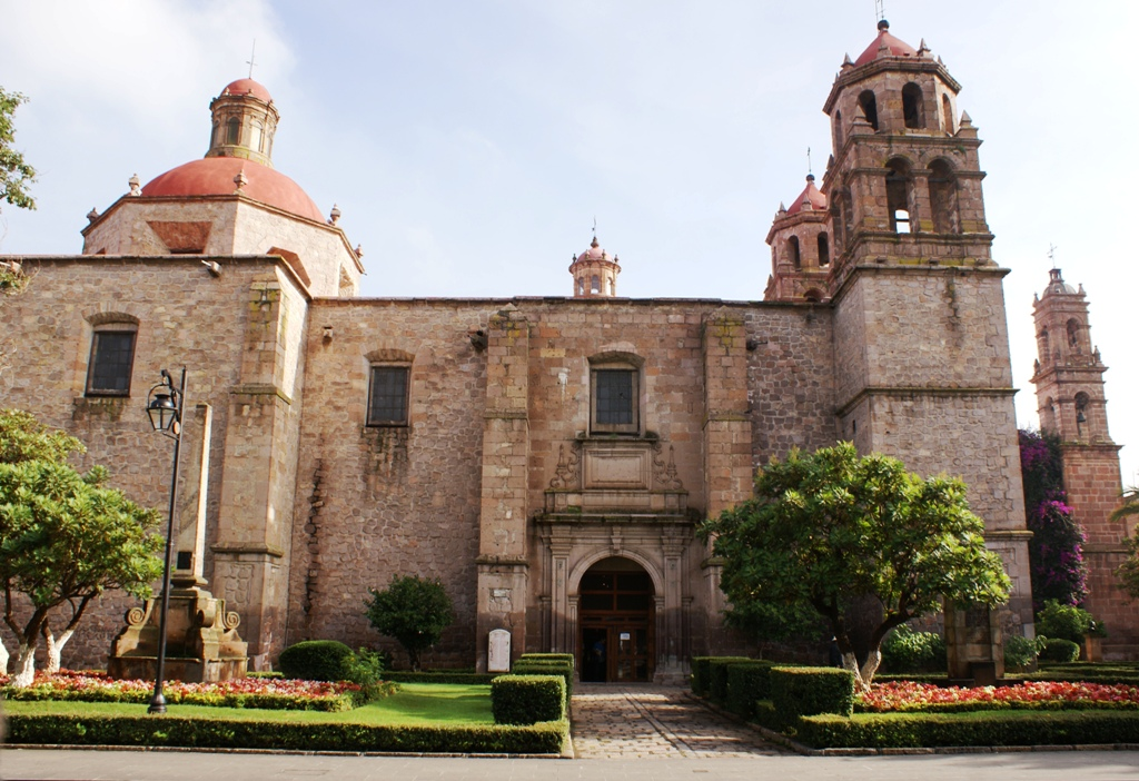 Biblioteca Pública de la Universidad Michoacana ubicada en Av. Madero Poniente esquina con Nigromante, Centro Histórico de Morelia, Michoacán, México. Fundada en 1930, conserva un fondo bibliográfico antiguo de 22,901 volúmenes, que van desde el siglo XV hasta principios del siglo XX. El edificio donde tiene su sede la biblioteca fue un templo de los Jesuitas durante la época del Virreinato de la Nueva España, construido en el siglo XVII en estilo barroco. En sui interior la biblioteca conserva murales al fresco pintado a mediados del siglo XX por los artistas estadounidenses Hollis Howard Holbrook, S. C. Schoneberg y R. Hansen así como del mexicano Antonio Silva Díaz.